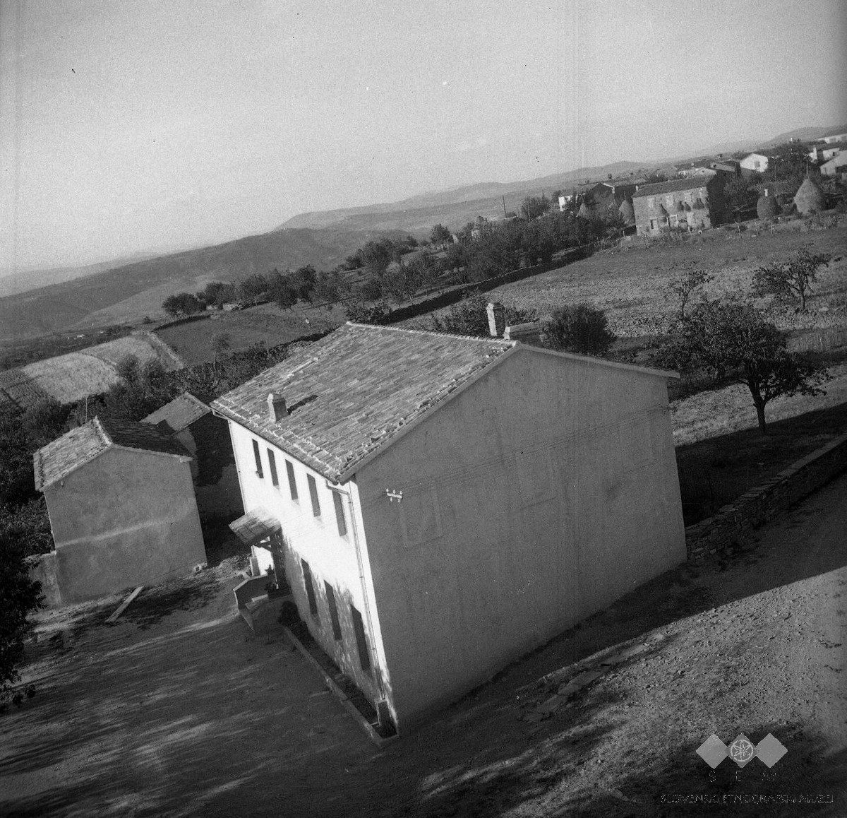 Šola v Marezigah- sedež ekipe, v ozadju je del Burjev.